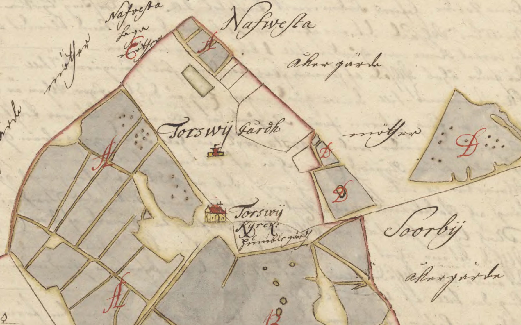 Torsvi socken Torsvigård nr 1 Geometrisk avmätning (detalj)